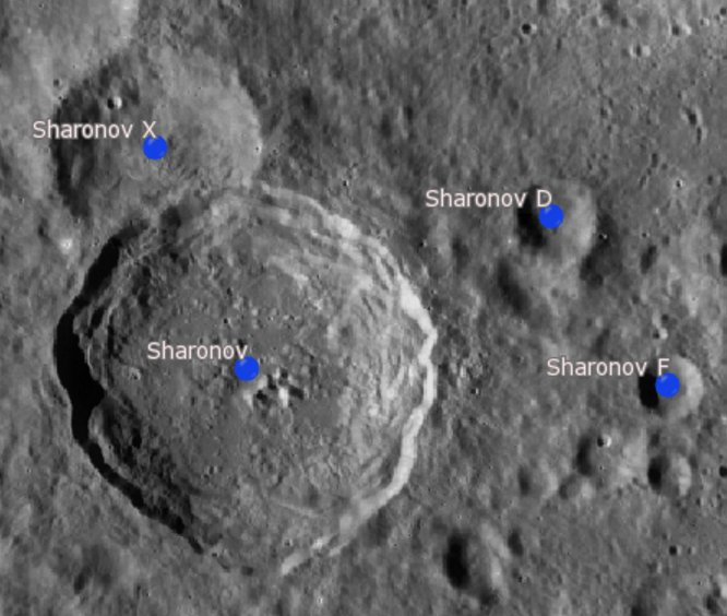 Cráter lunar Sharonov. Cráteres satélite. (Imagen LRO)